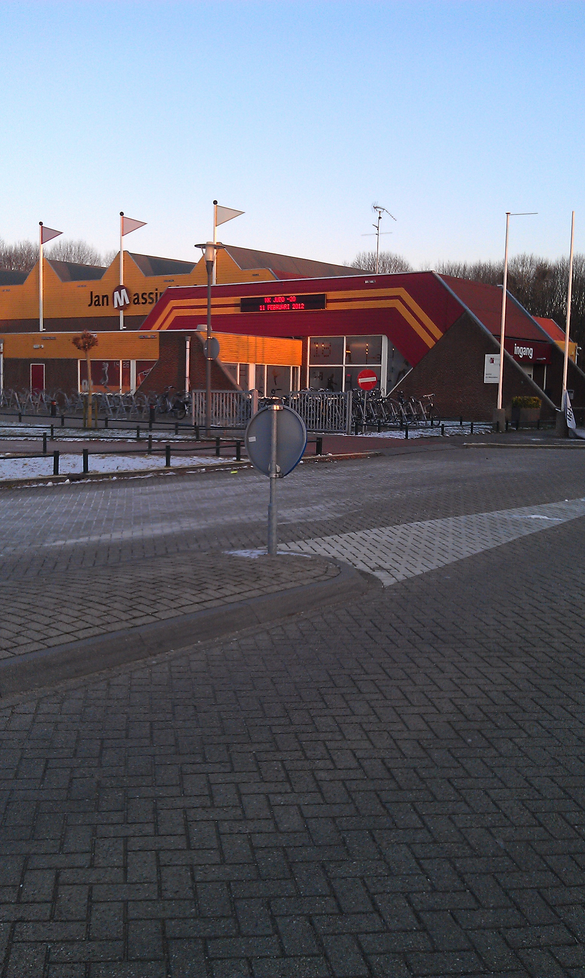 De ingang van de Jan Massinkhal aan de Nieuwe Dukenburgseweg in Nijmegen, Gelderland, Nederland.